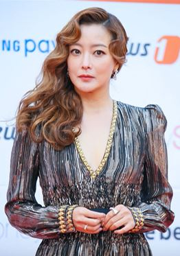 김희선이 지난 15일 오후 서울 송파구 잠실실내체육관에서 열린 '2017 아시아 아티스트 어워즈(2017 Asia Artist Awardsㆍ이하 2017 AAA)' 레드카펫 행사에서 참석하고 있다